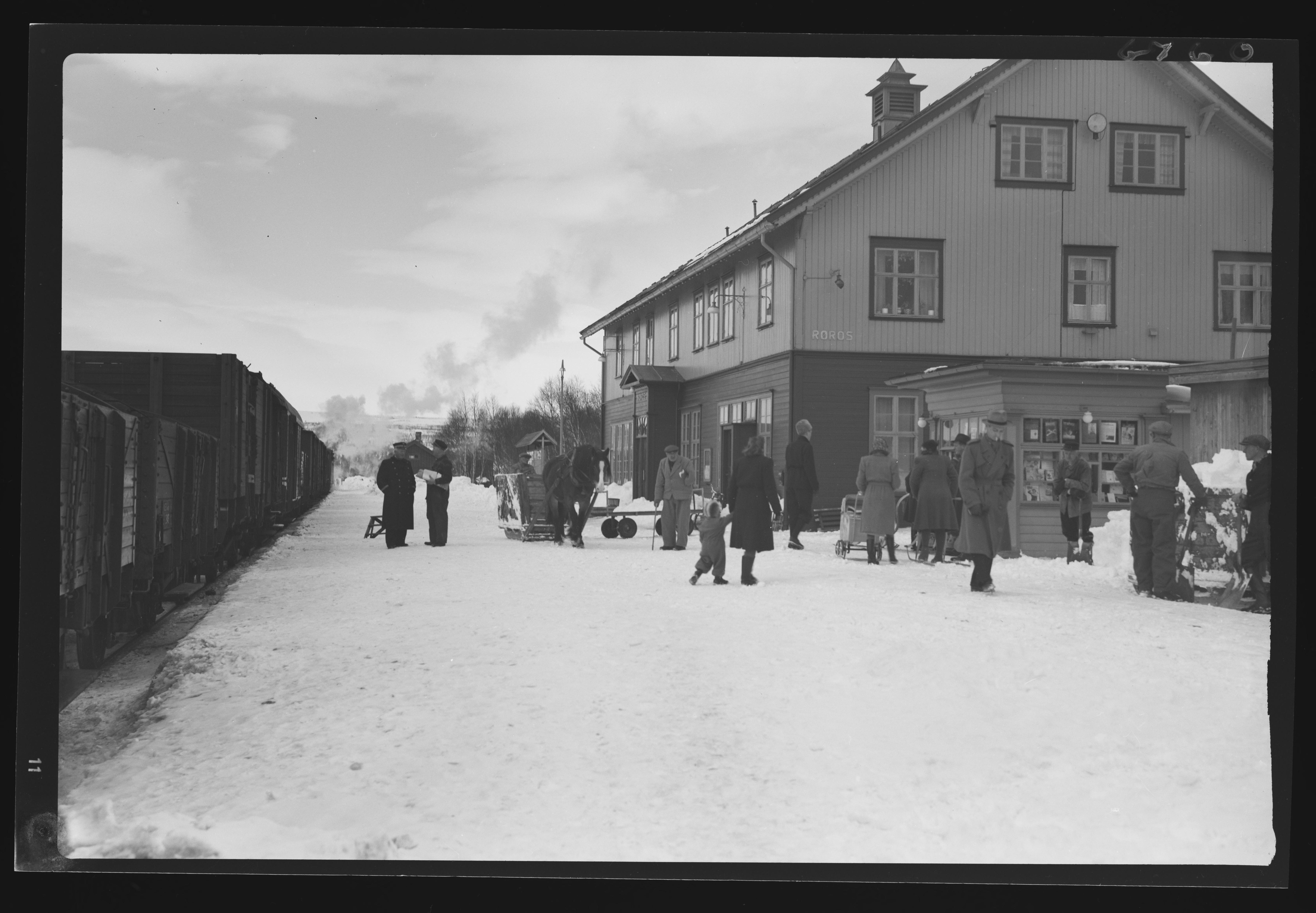 Bildet er hentet fra Nasjonalbibliotekets bildesamling. Anmerkninger til bildet var: Fotograf:Ukjent Røros, Røros, Sør Trøndelag